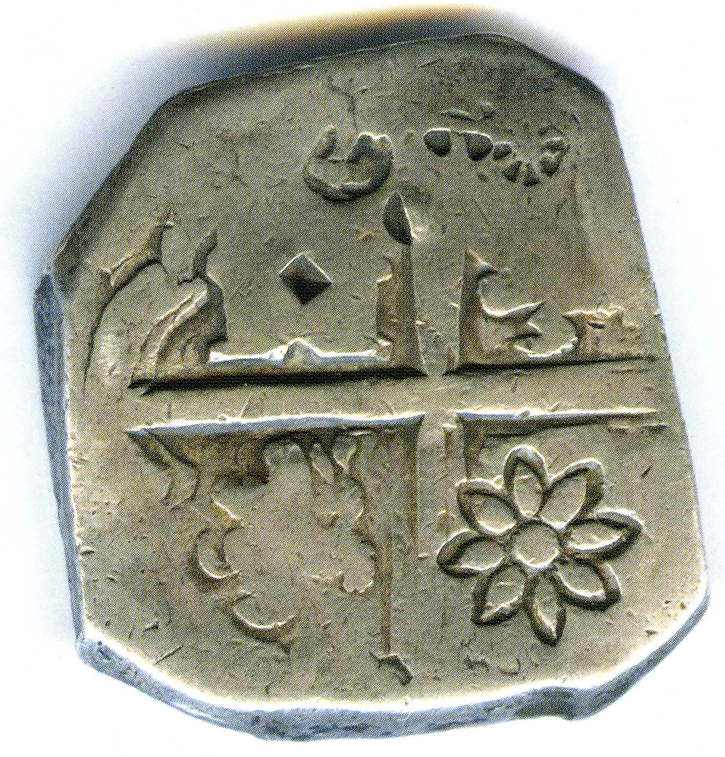 Moneda extranjera utilizada en Borneo